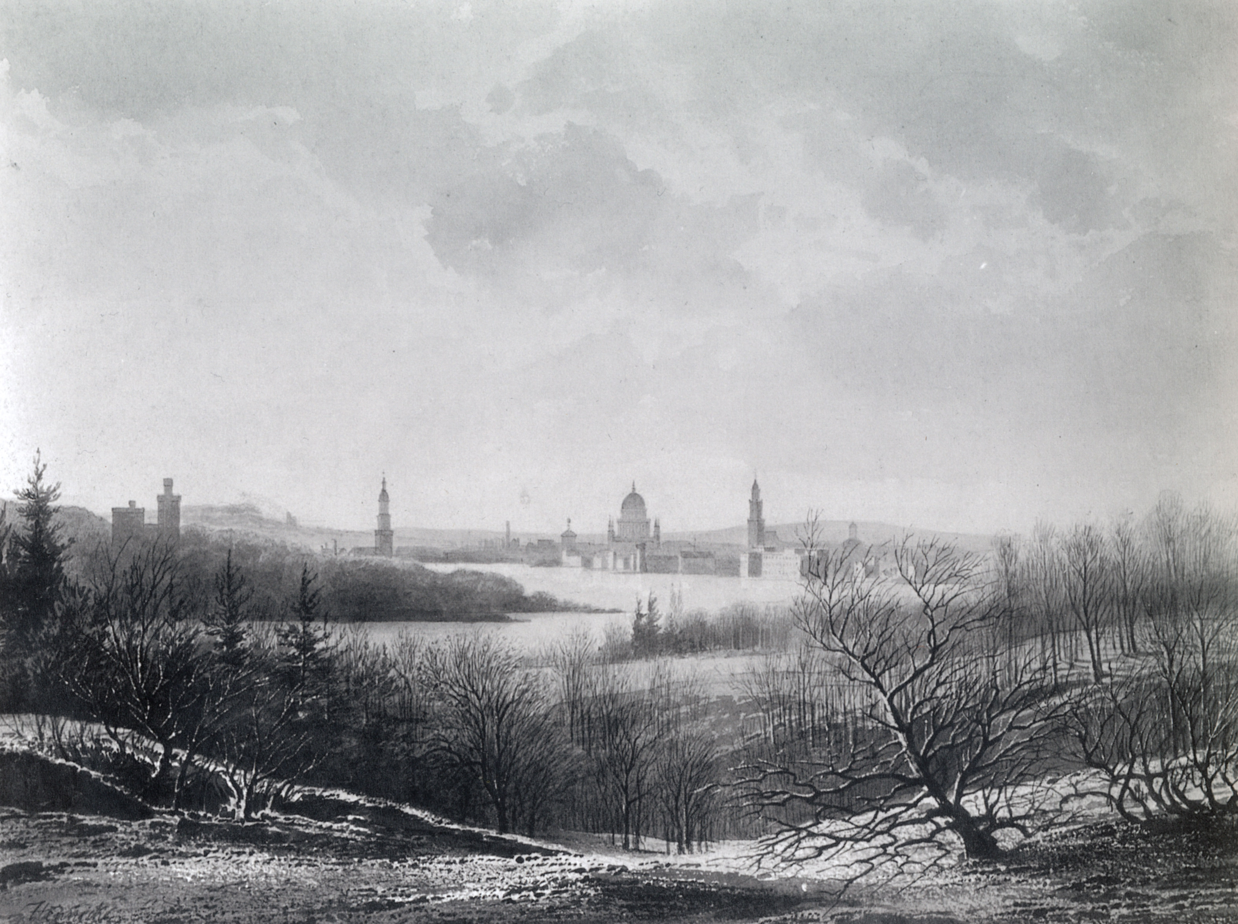 Blick von der Borkbank auf Potsdam (Julius Hennicke, um 1852)